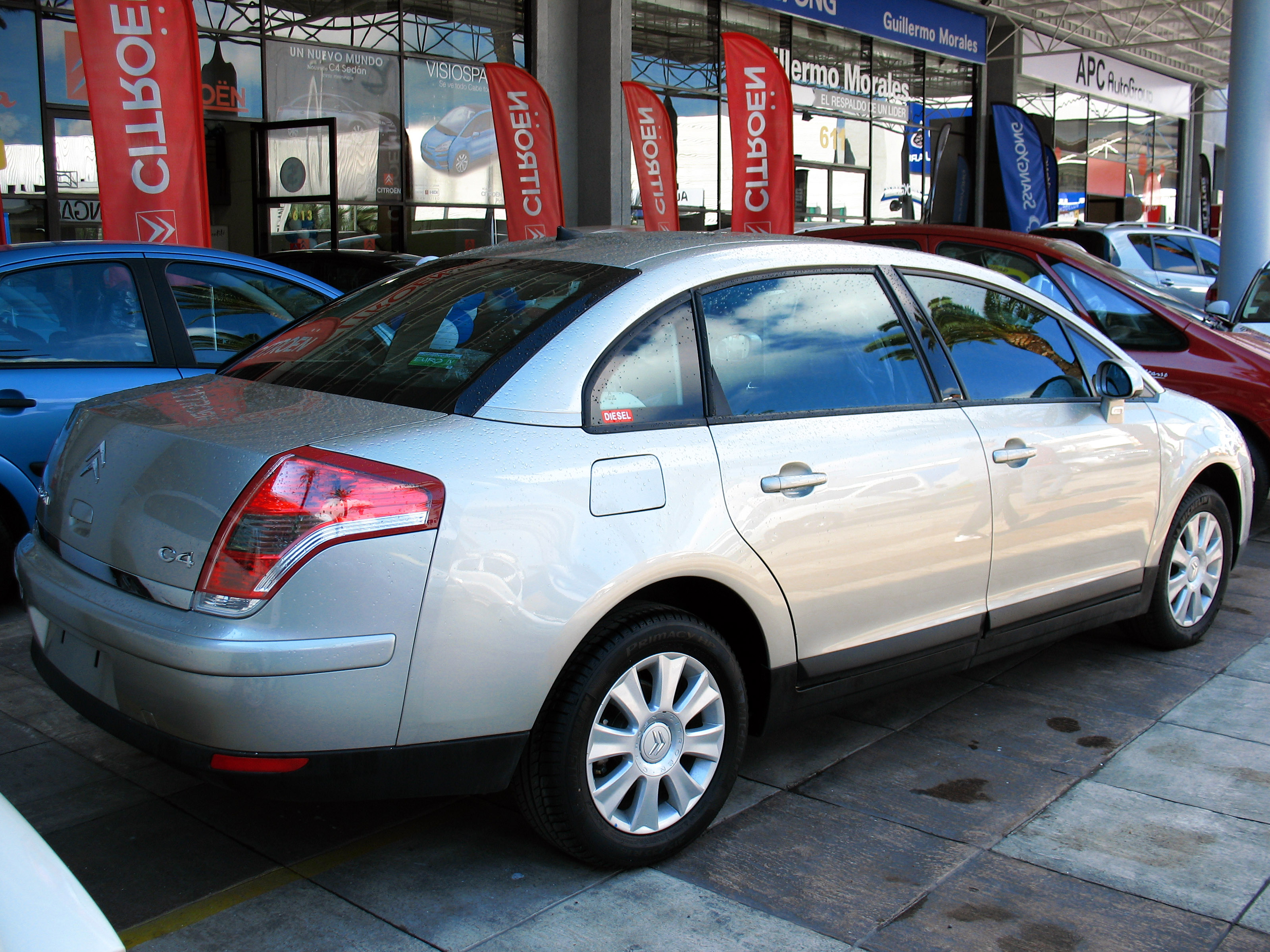 Citroen C4 1.6 HDi Sedan 2009